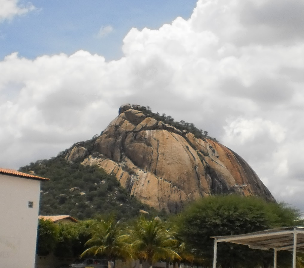 Serra da Barriguda, em Alexandria, a primeira maravilha do Rio Grande do Norte - Brasil.